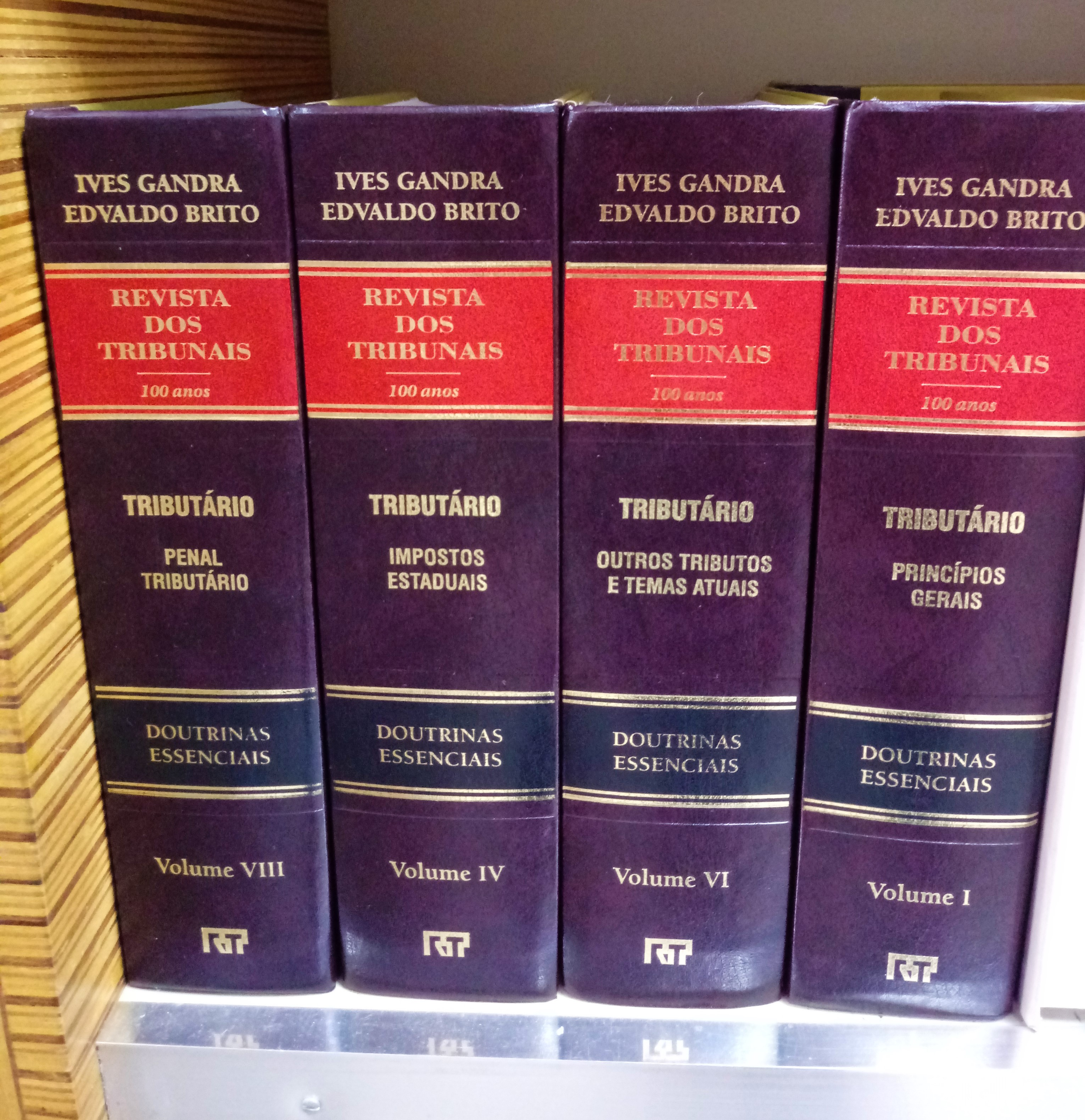 Obras de literatura jurídica, na área de direito tributário do Brasil no Riverside Shopping, Teresina.